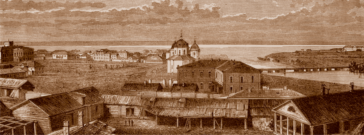 Омск в конце XIX в.: Ильинская церковь, перед ней приют «Надежда», жилые дома. Рисунок из книги «Живописная Россия» (СПб., 1886. Т. 11)